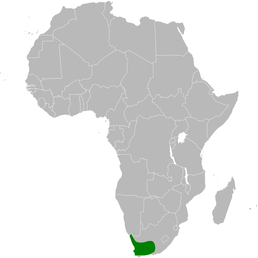 Calendulauda albescens distribution map, based on